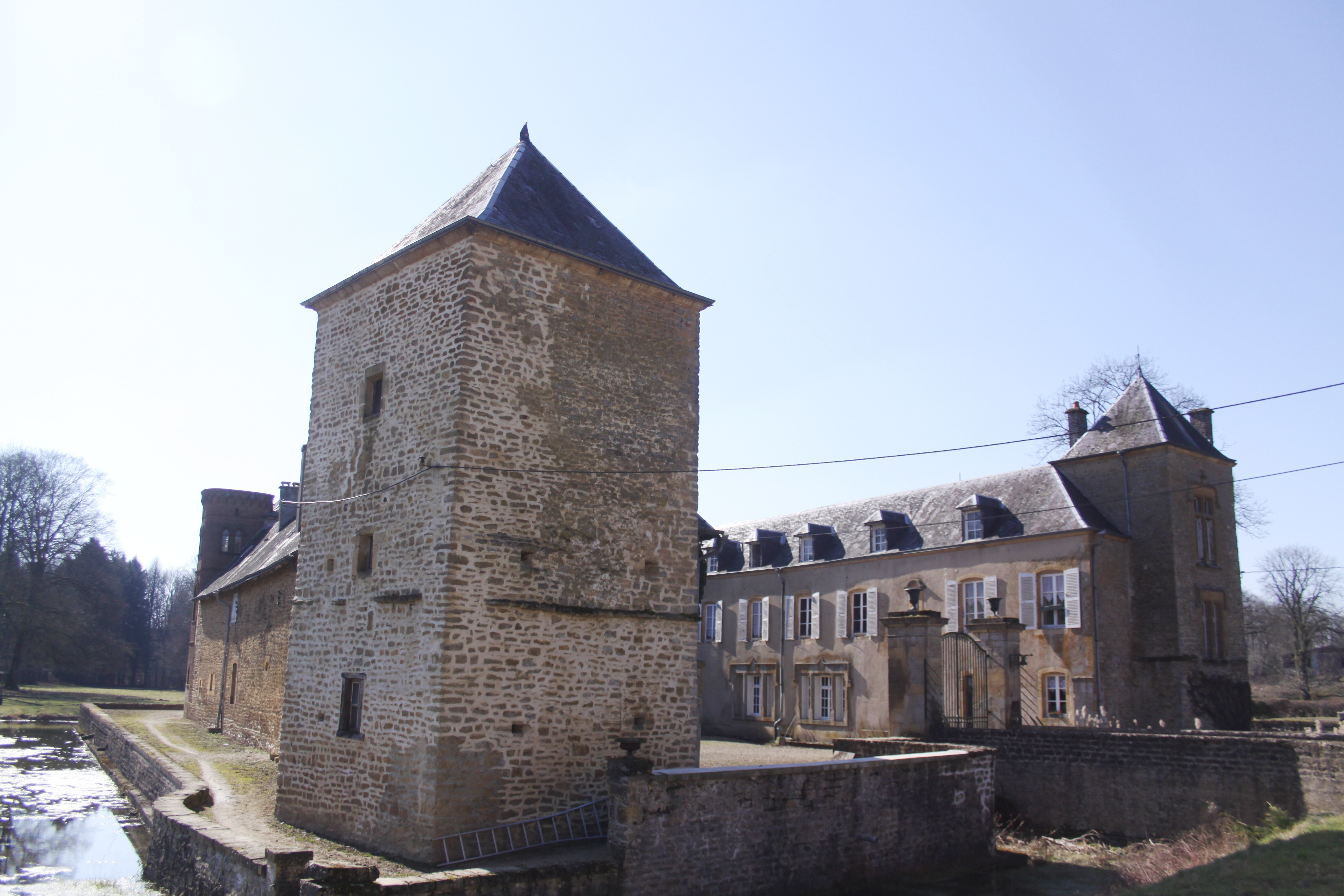 Château de Lamecourt (Rubécourt-et-Lamécourt, Ardennes, France) .